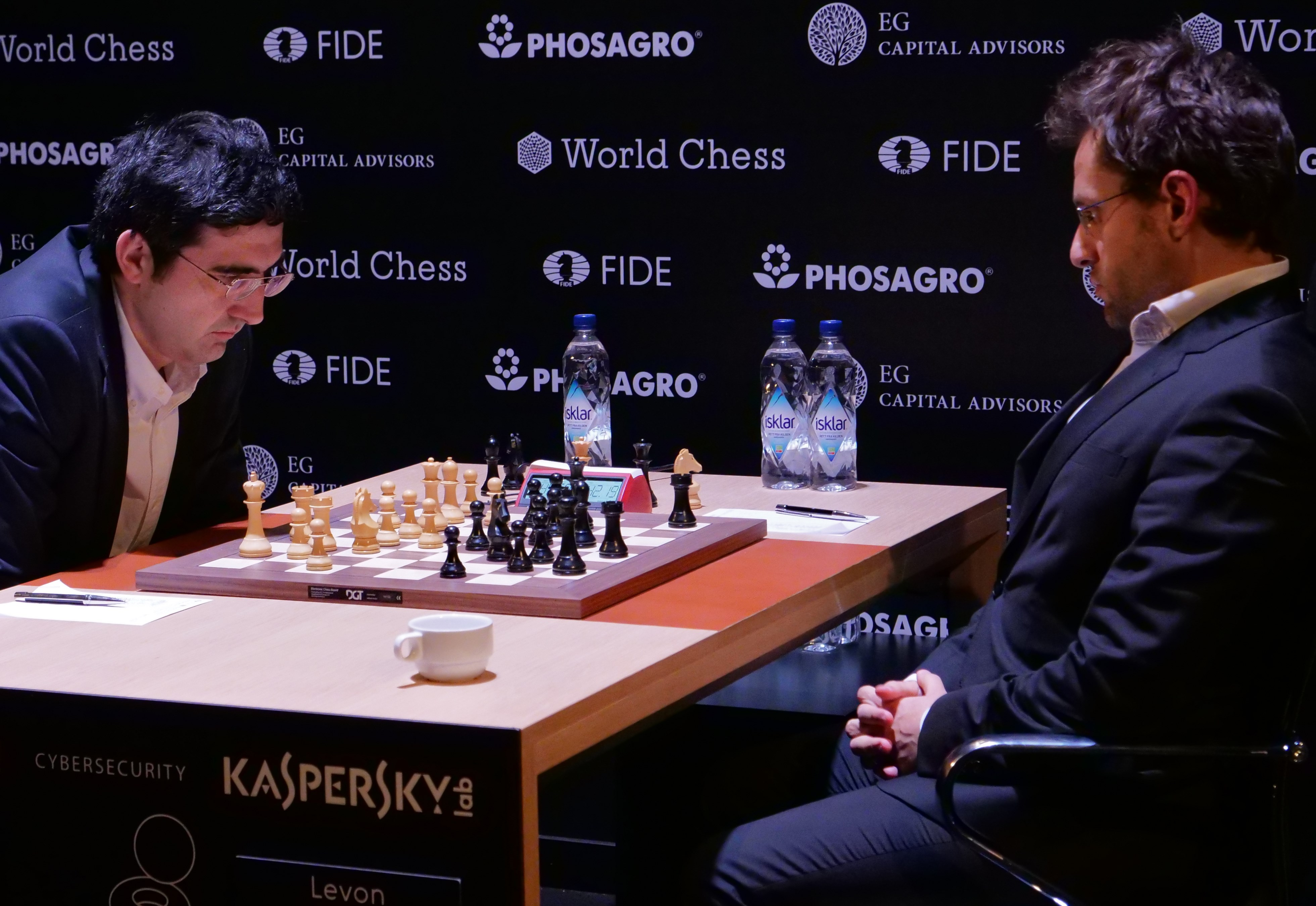 Wladimir Kramnik (li.) und Lewon Aronjan, Kandidatenturnier Berlin 2018, 10. Runde